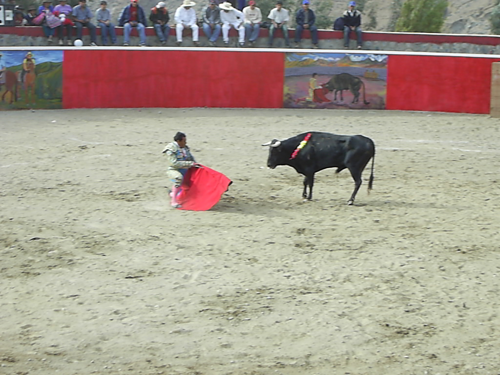 Tardes Taurinas en Ocaña Peru